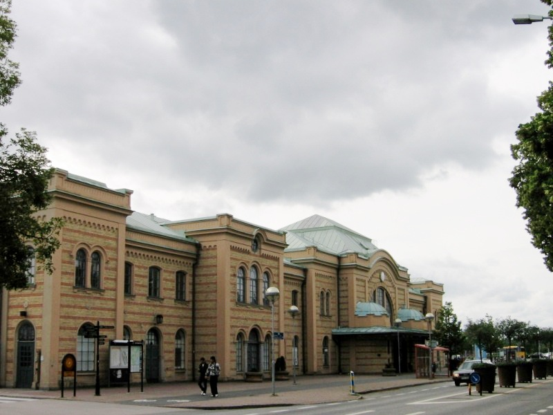 Kristianstad Järnvägsstation